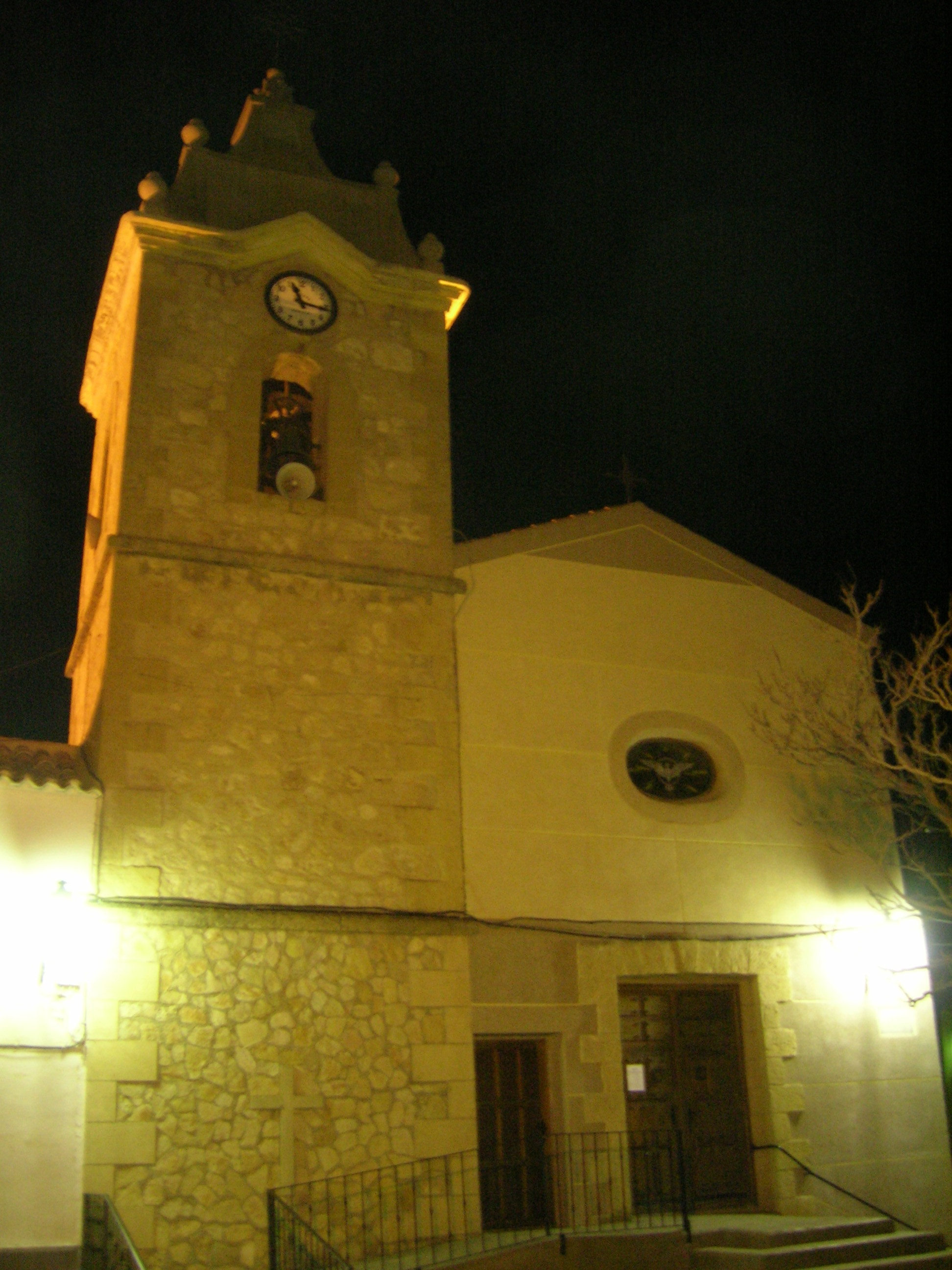 Iglesia de San Pedro, municipio de Albacete, Castilla-La Mancha, España.